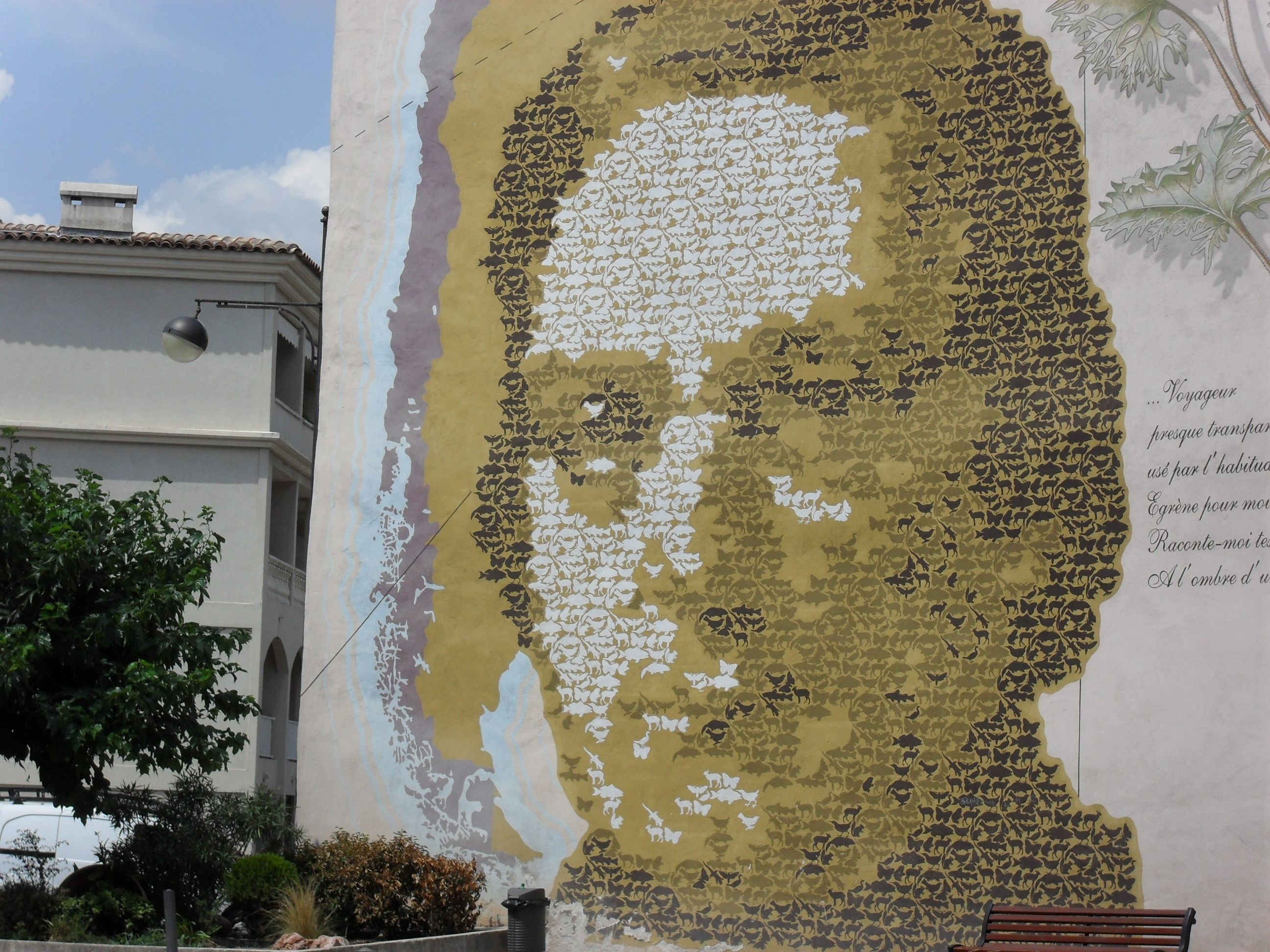 Portrait de Claude Gay à Draguignan, vu depuis le marchand d'huîtres du boulevard de la Liberté. Le portrait est constitué de plusieurs centaines images d'animaux sauvages.